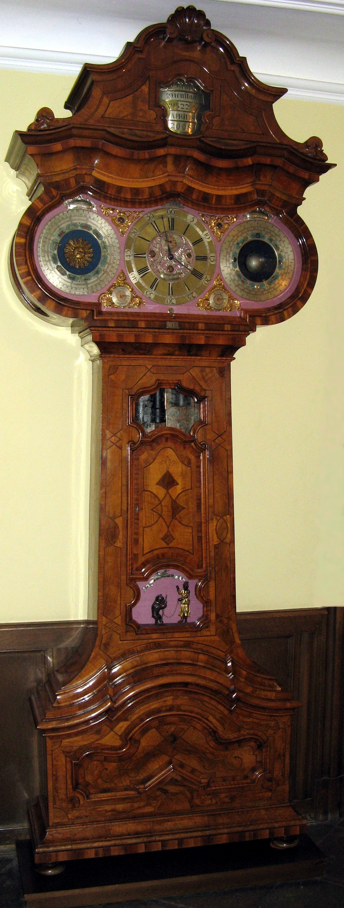 Huesgen-Uhr im Goethe-Haus, Frankfurt. Ursprünglicher Besitzer der Uhr war Hofrat Wilhelm Friedrich Hüsgen, ein Autodidakt, der die Uhr nach eigenen Plänen von den Gebrüdern Kinzing in Neuwied erbauen ließ. Dann erbte sie sein Sohnes Heinrich Sebastian Hüsgen. 1933 erwarb sie das Freie Deutsche Hochstift. Seitdem wird diese Uhr auf dem Vorplatz zum 2. Stock des Goethe-Hauses präsentiert.